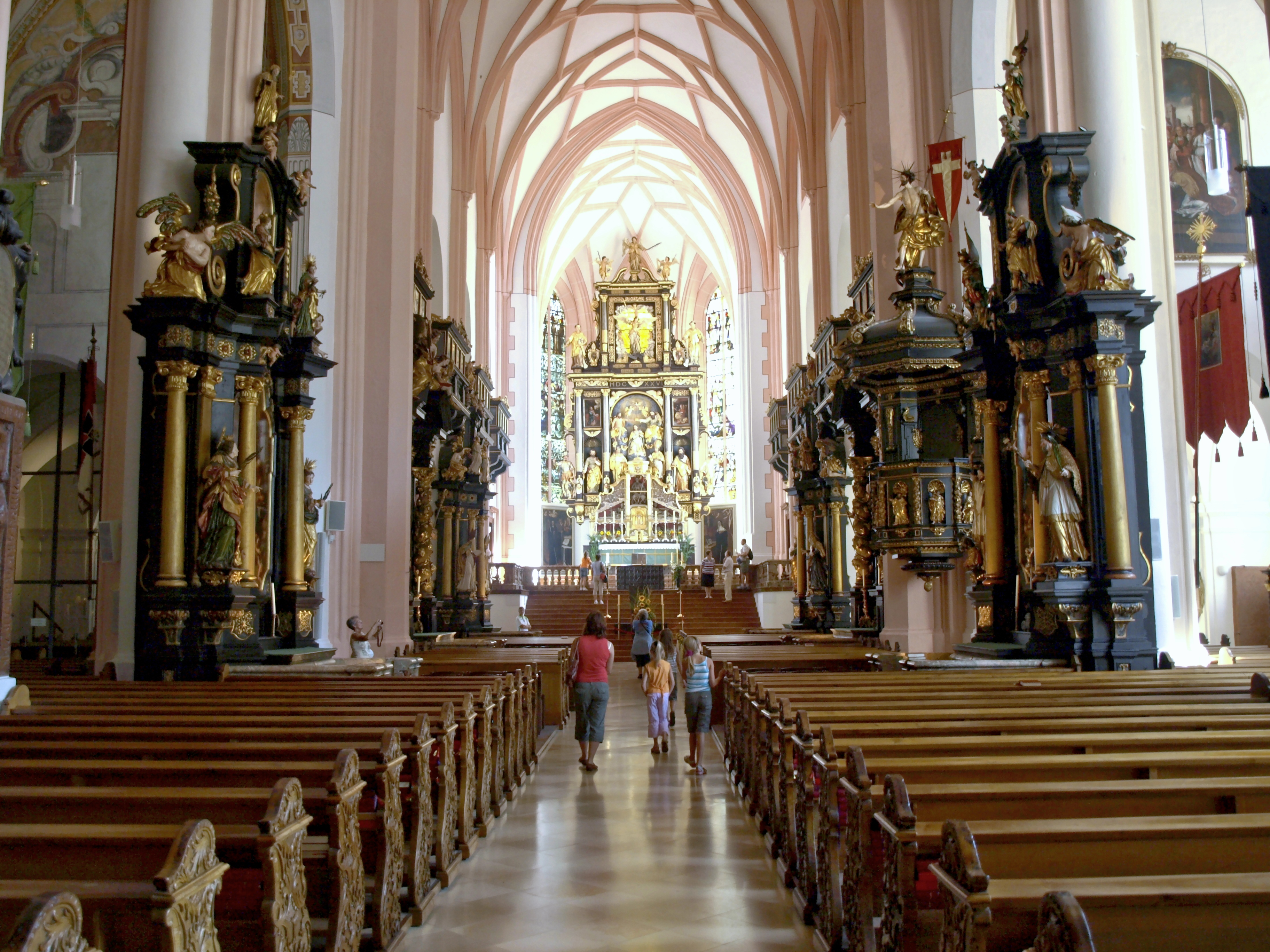 Gesamtanlage Schloss Mondsee